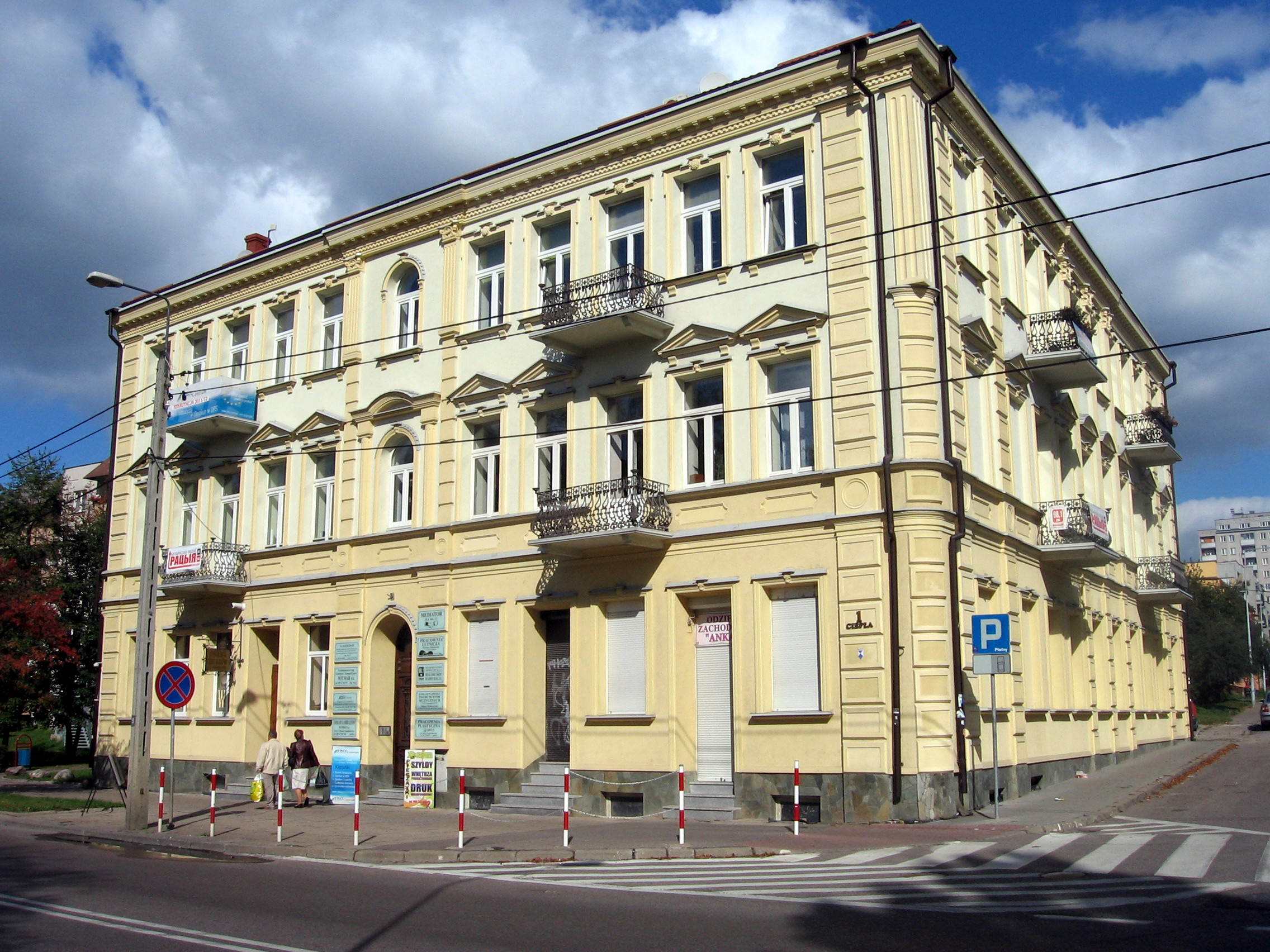 Białystok, ul. Ciepła 1 / Jurowiecka - kamienica w dniu 24 września 2011 roku (zabytek nr A-314 z 11.06.1993)